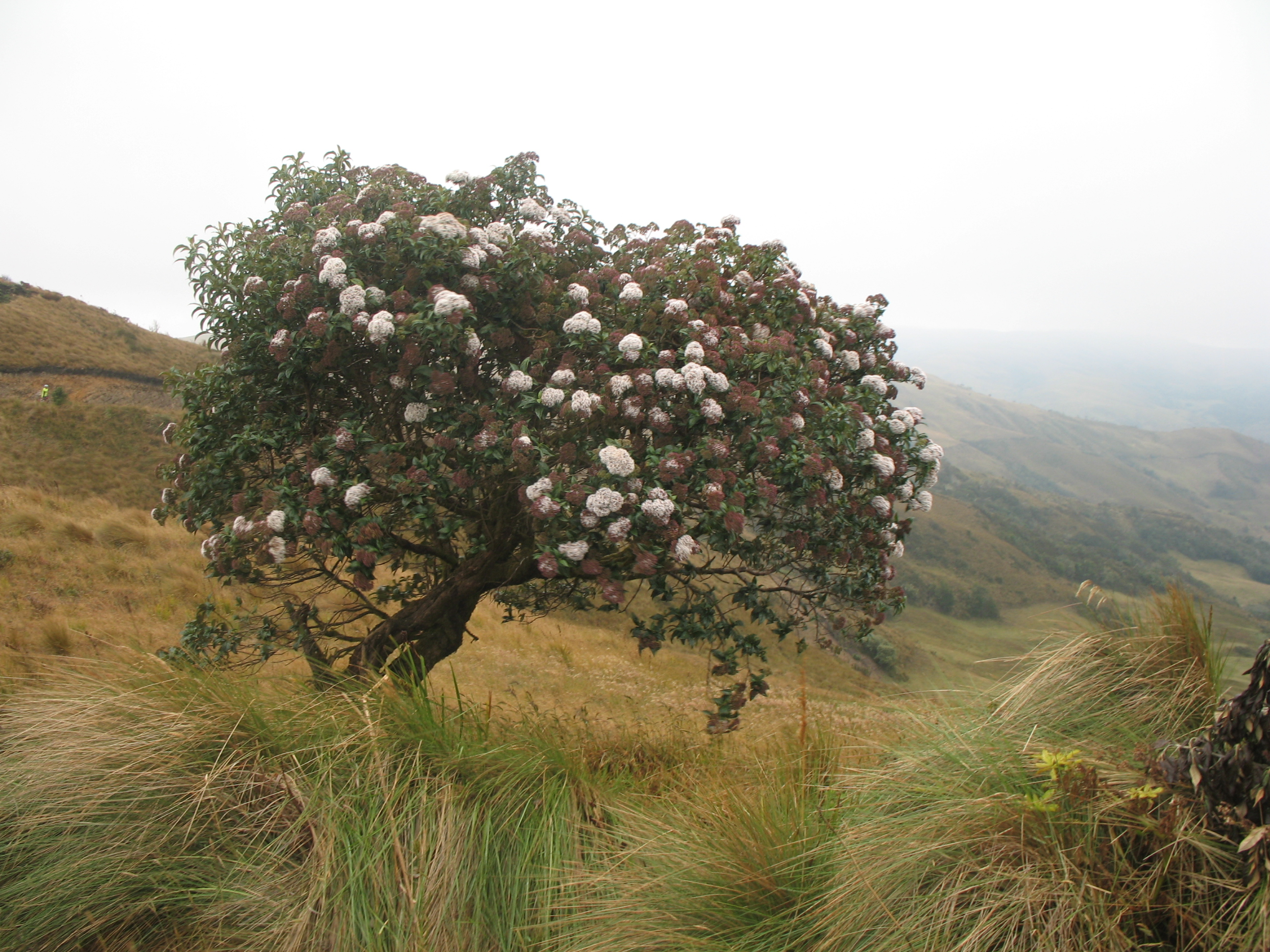 Ballidoa salicina, Ecuador-Azuay, a 3000 msnm